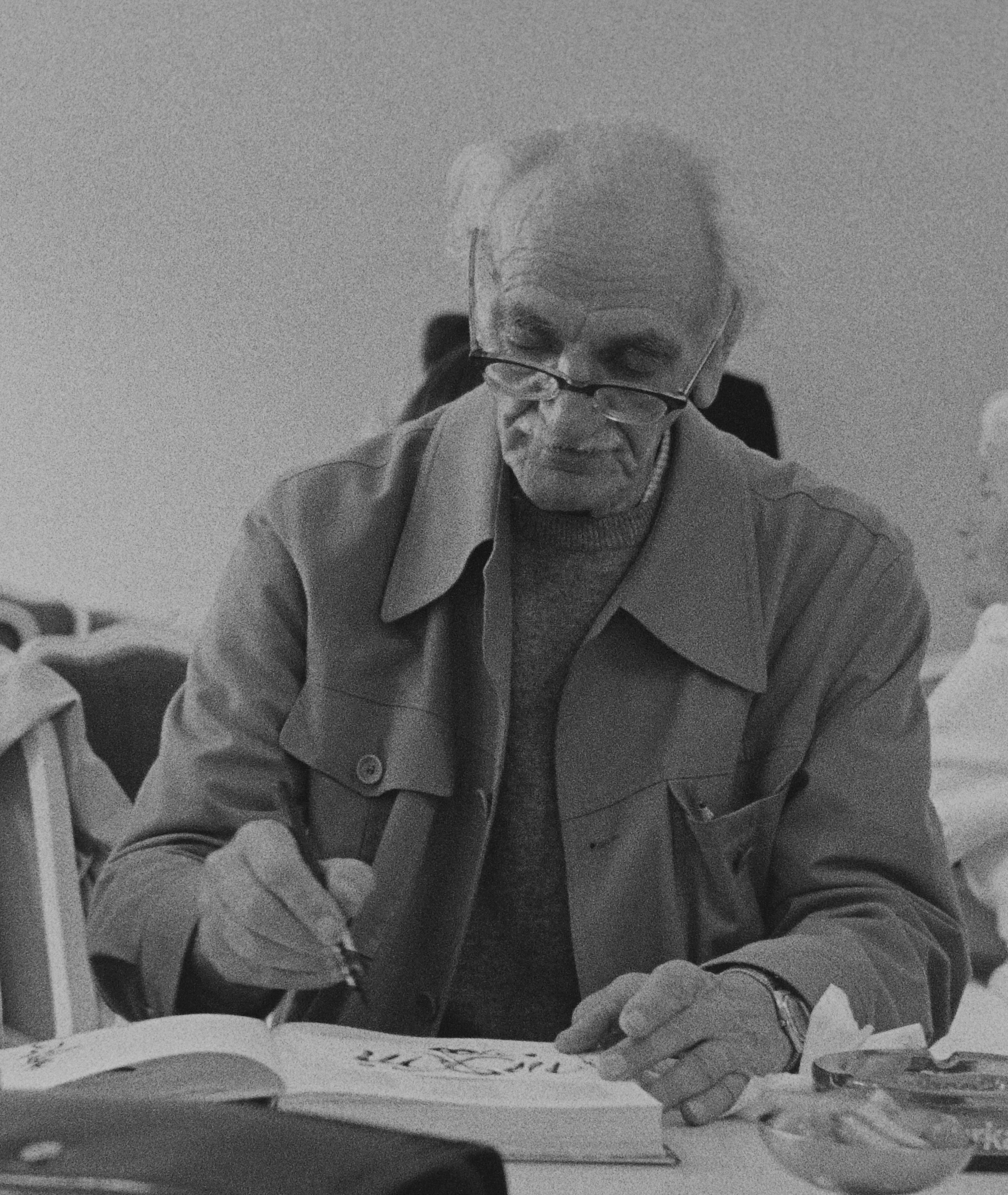 Das Foto entstand während einer Buchpräsentation über Jakob Roider in Freising.